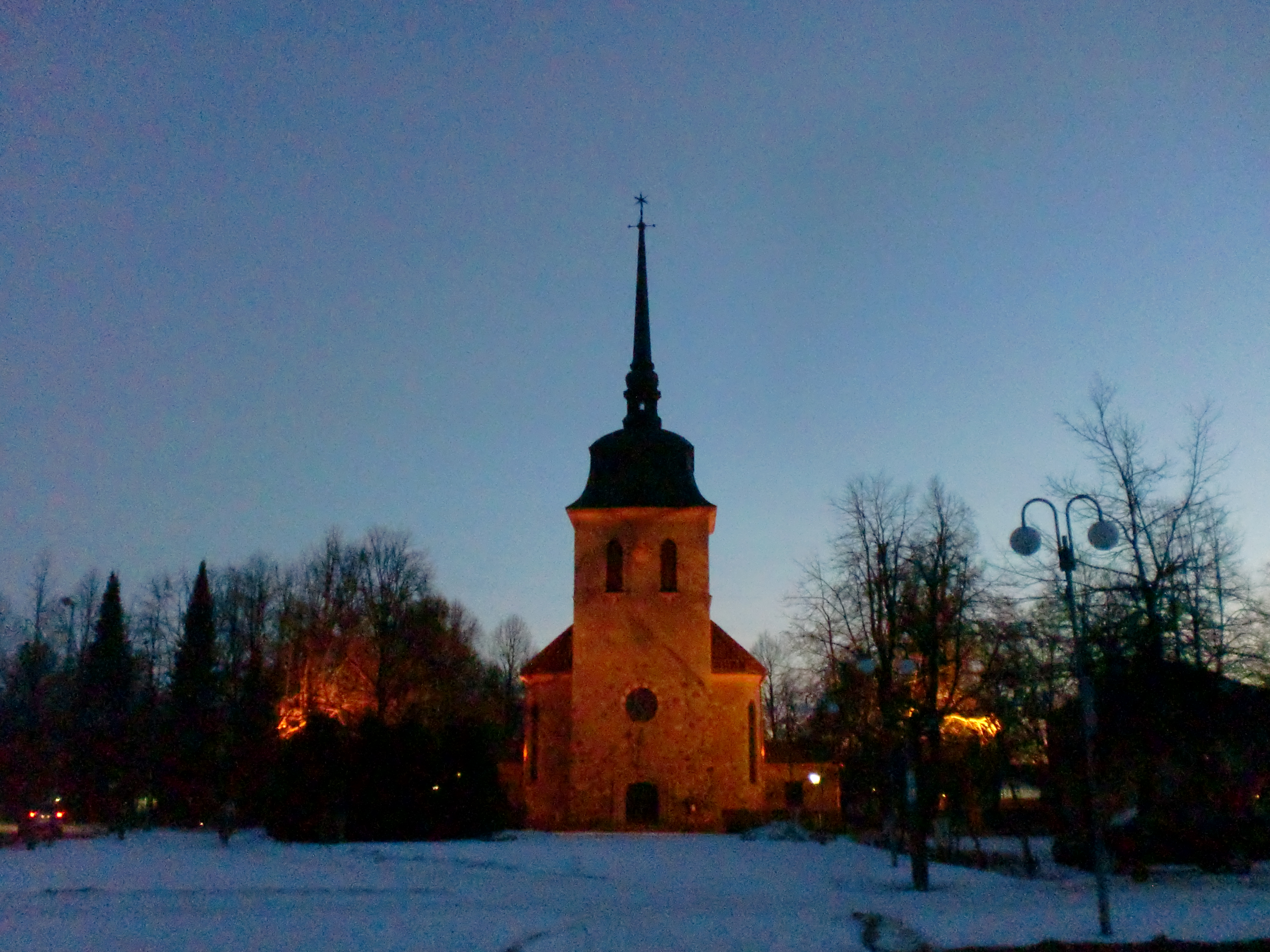 Mäntän kirkko; kirkkorakennus Mänttä-Vilppulassa